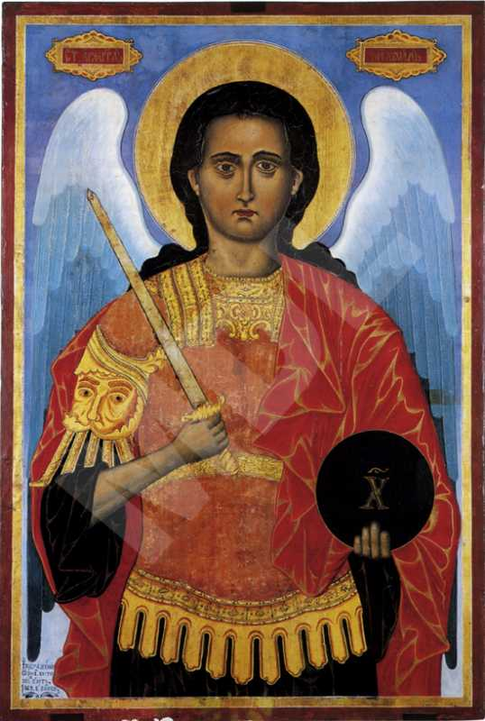 Икона на Архангел Михаил от Иван Костов Терзиев